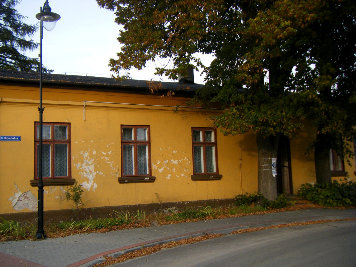 Gmach Towarzystwa Przyjaciół Ziemi Brdowskiej, Klub Seniora i siedziba MKS Brdów.